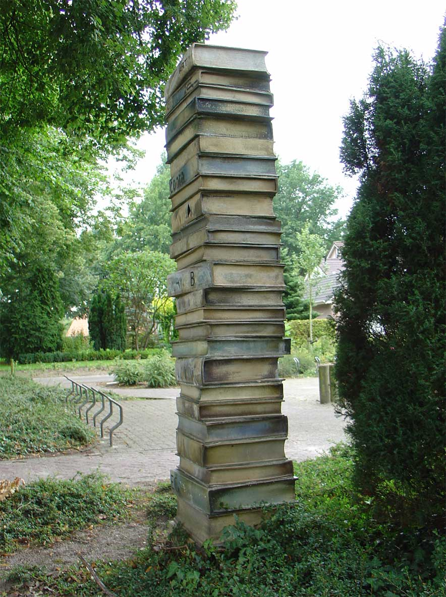 "Zonder titel" standbeeld op de Eexterweg van Gieten, beeldhouwer Kees van Renssen